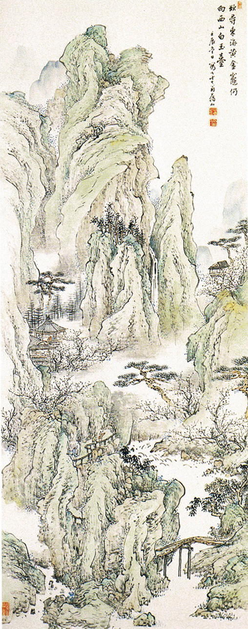 谷口藹山筆 山水図 紙本彩色軸装